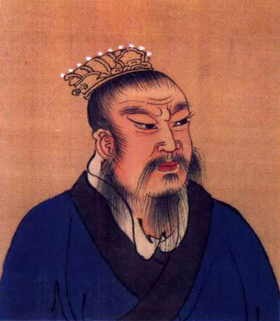 劉邦 肖像